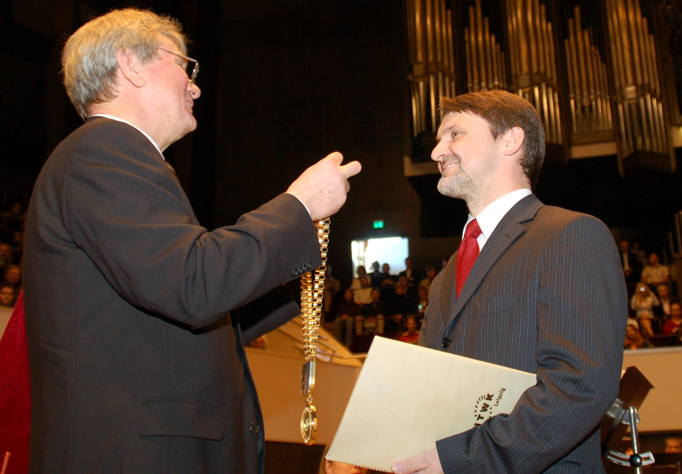 Hubertus Milke bei der Rektoratsübergabe im Neuen Gewandhaus zu Leipzig (2006)